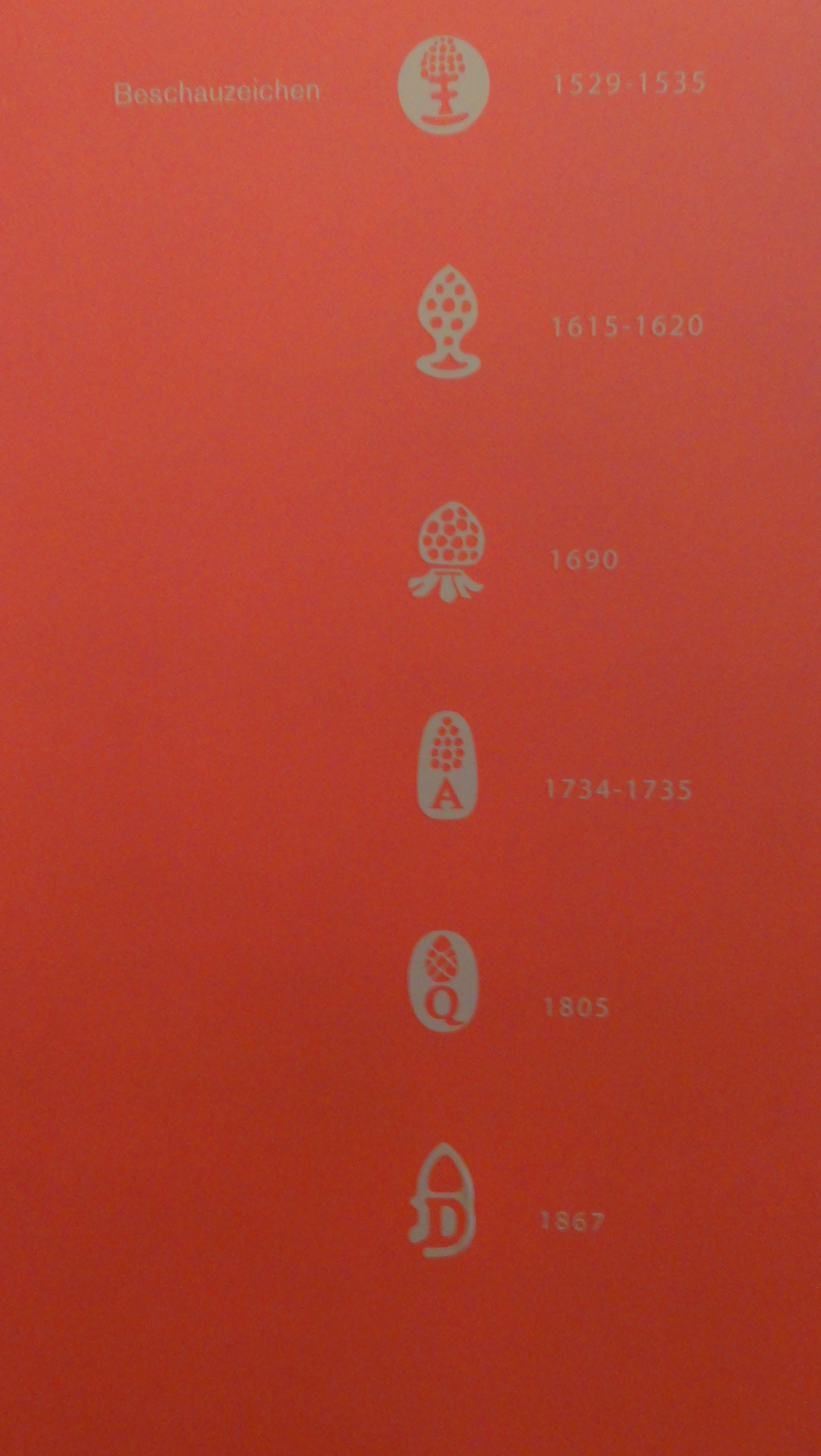 Augsburg, Maximilianmuseum